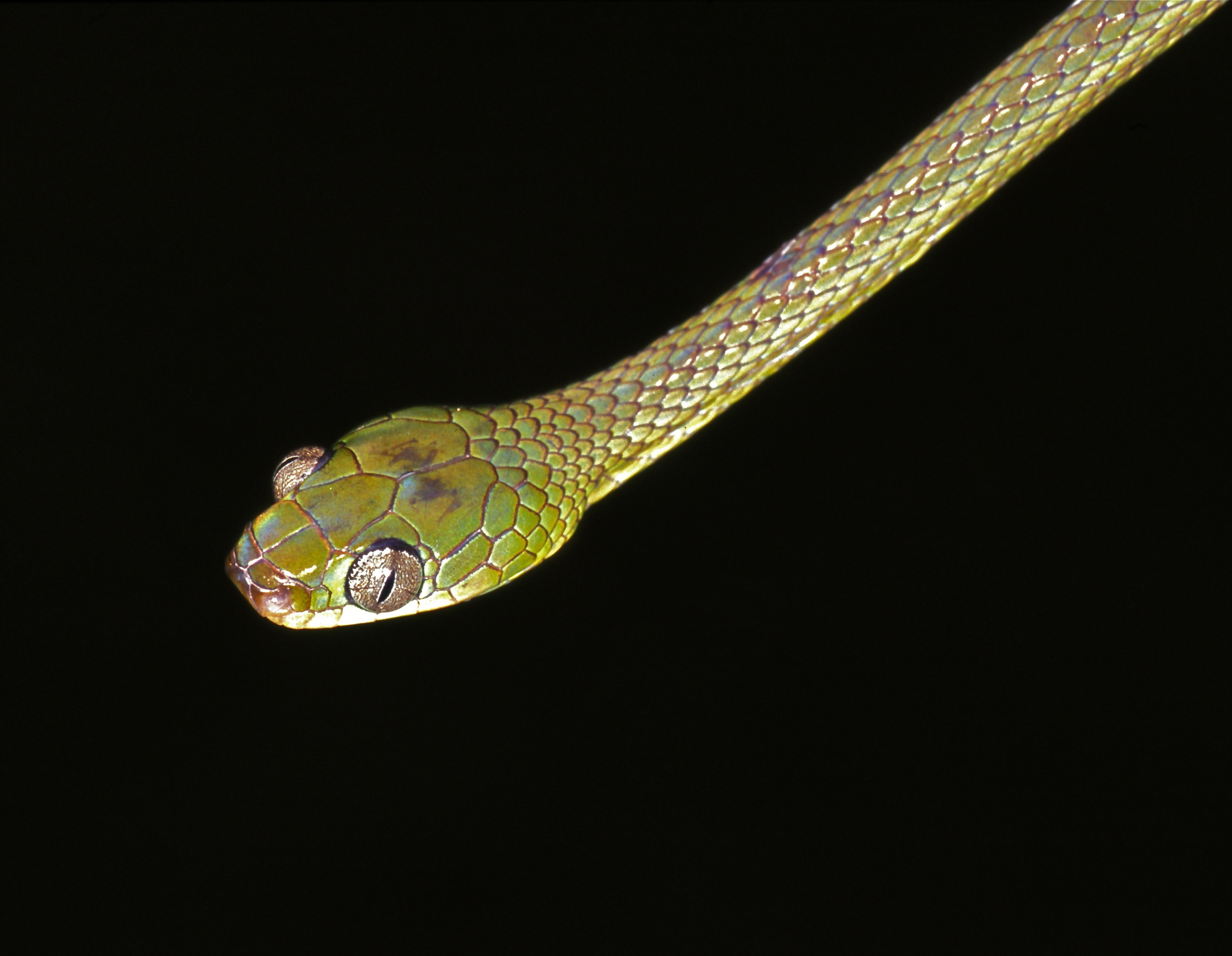 Korup NP, CAMEROON